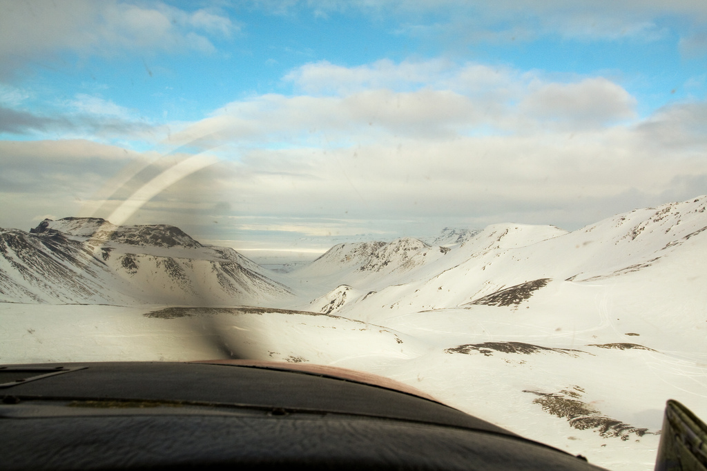 Bláfjöll/Iceland